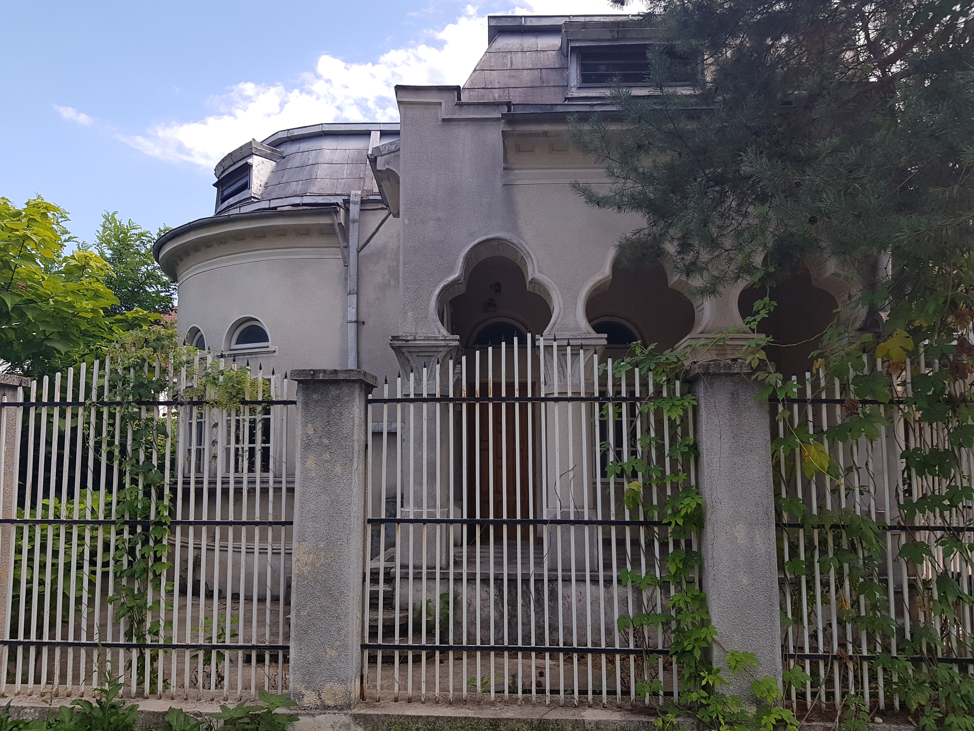 Vila Cicinetta